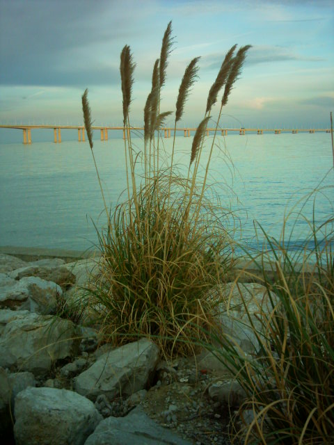 Erva-das-pampas (Cortaderia selloana) no Parque das Nações, em Lisboa